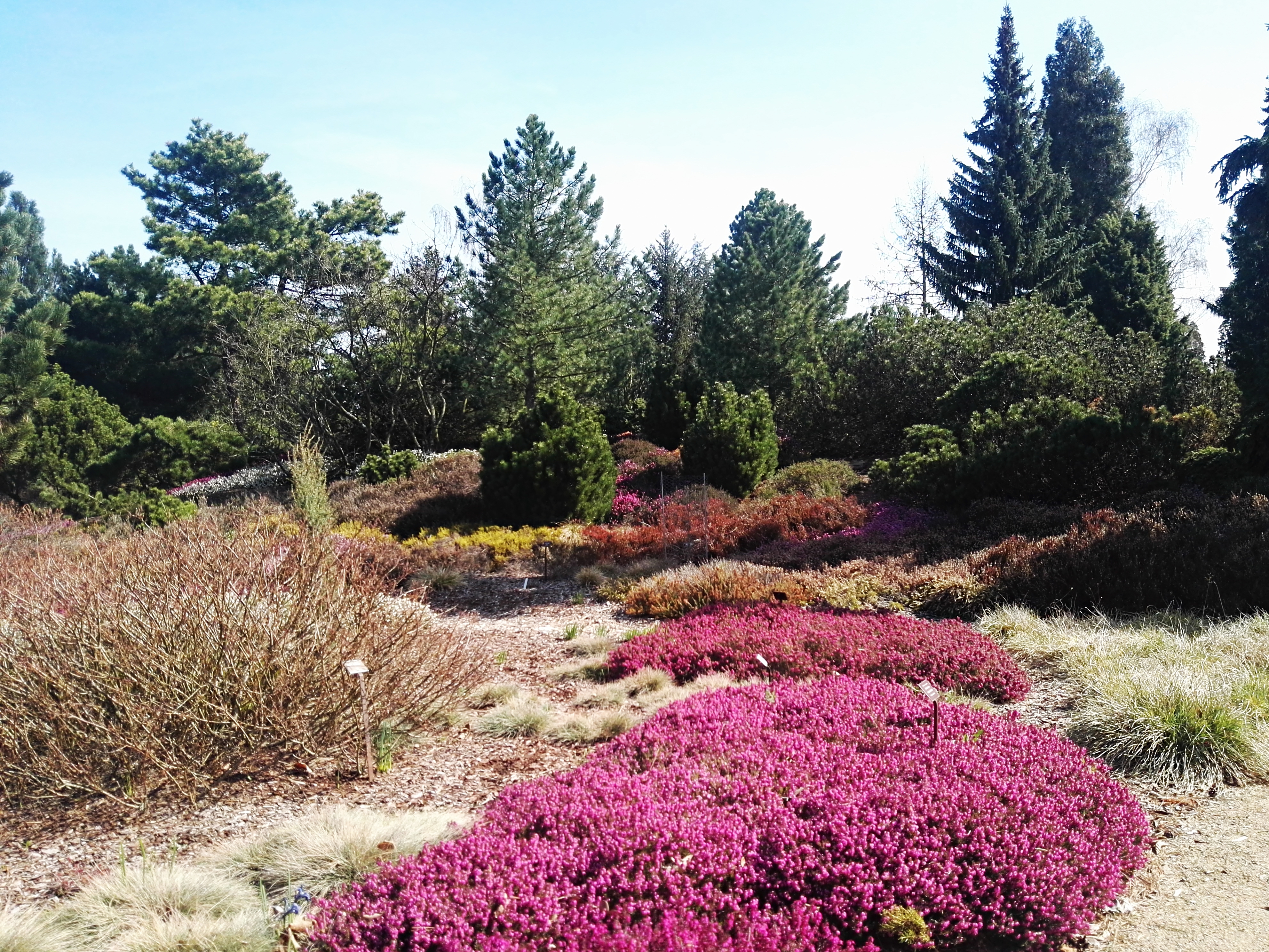 Vřesy "Na Valech" v průhonické Dendrologické zahradě